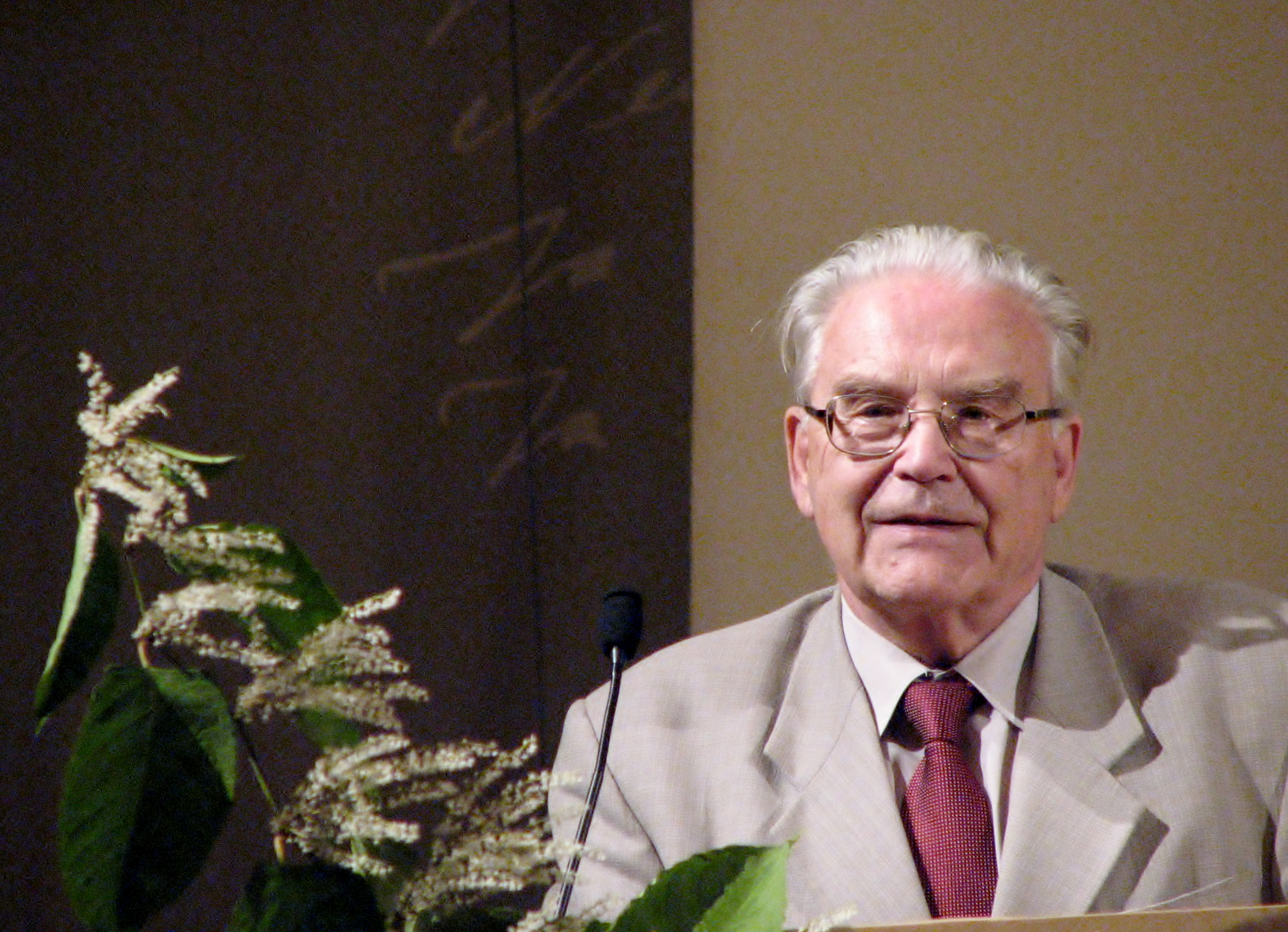 Anto Raukas rääkimas Maaema messi raames peetud konverentsil "Tervis puhtast loodusest" geoparkidest ja loodusturismist maaelu edendajatena